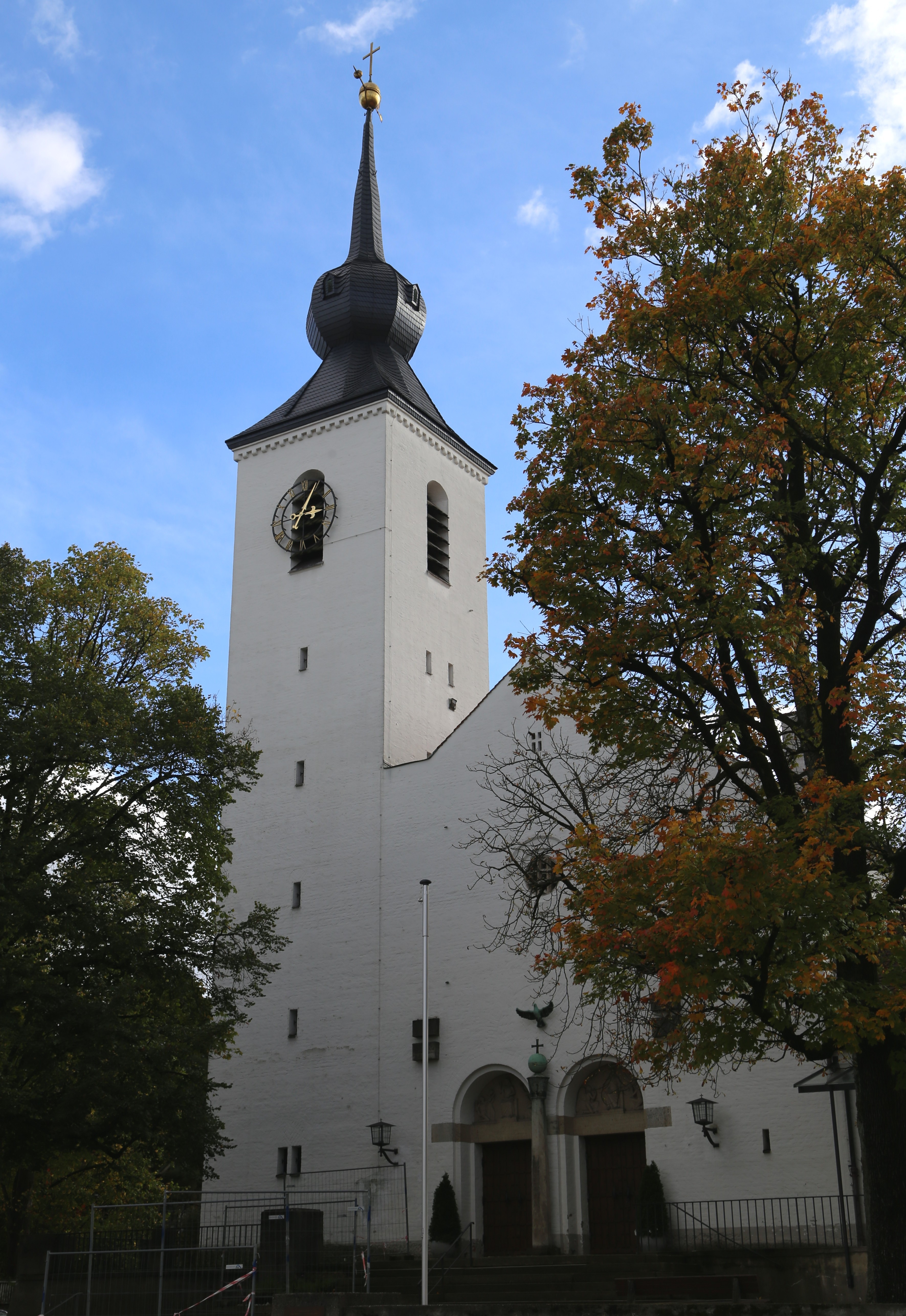 Merzstraße 11; Wehrlestraße 8, München; Evang. Luth. Dreieinigkeitskirche historisierender Saalbau mit eingezogenem Chor und nordöstlichem Zwiebelturm, von Horst Wünscher, 1936/37